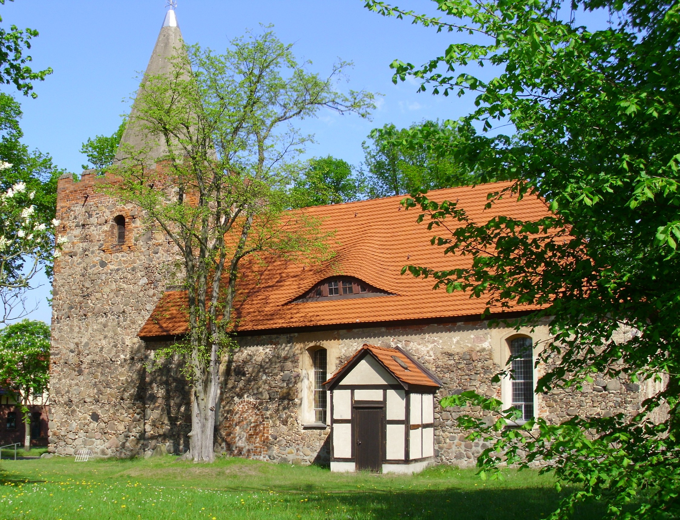 Spätgotische Feldsteinkirche in Rauen